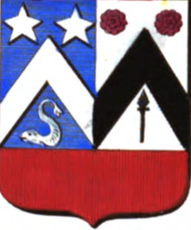 Armes de la famille van de Walle